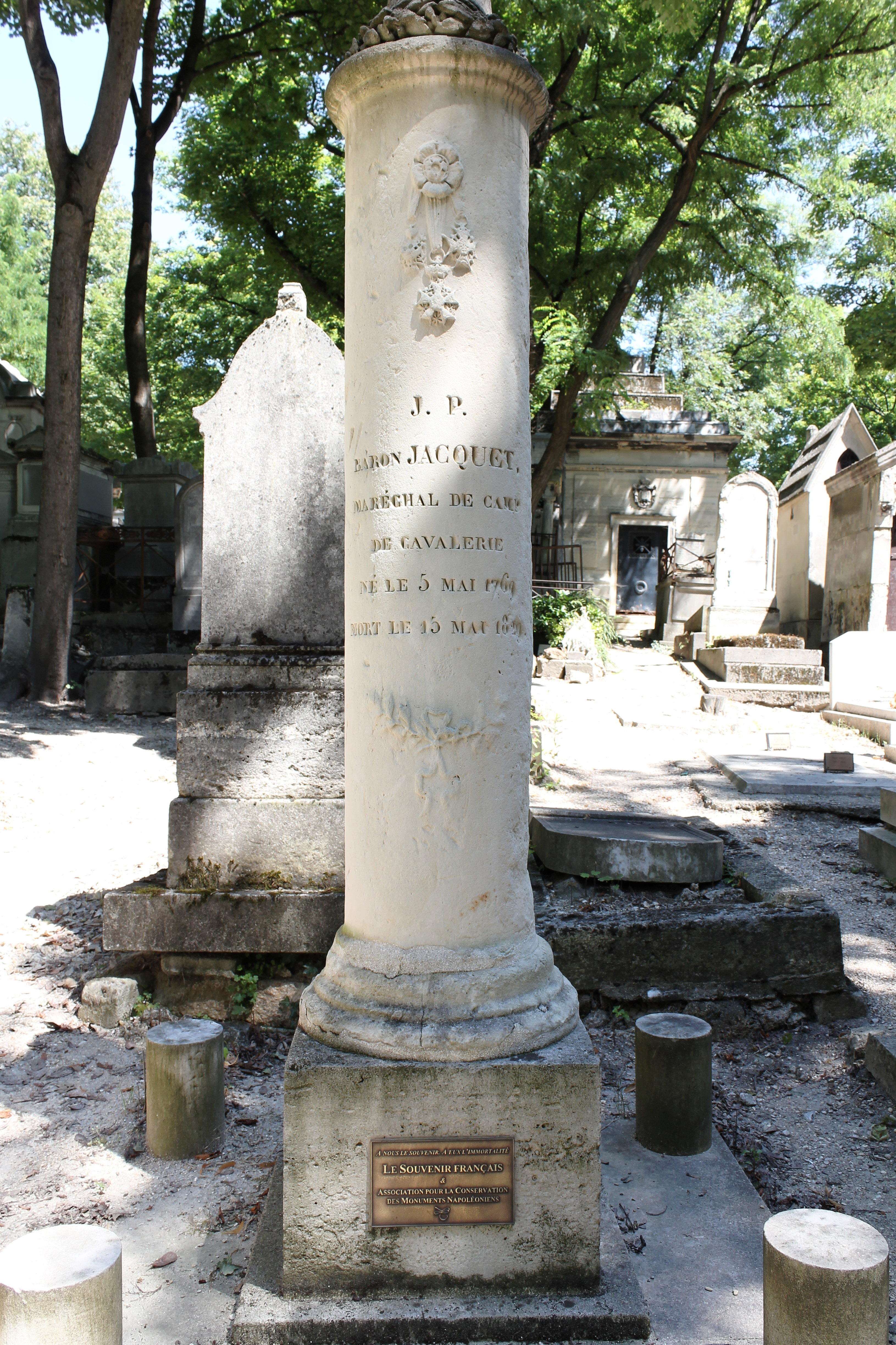 Colonne en pierre surmontée d'un casque